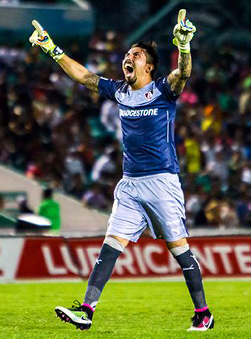 atlas vs chiapas 2016